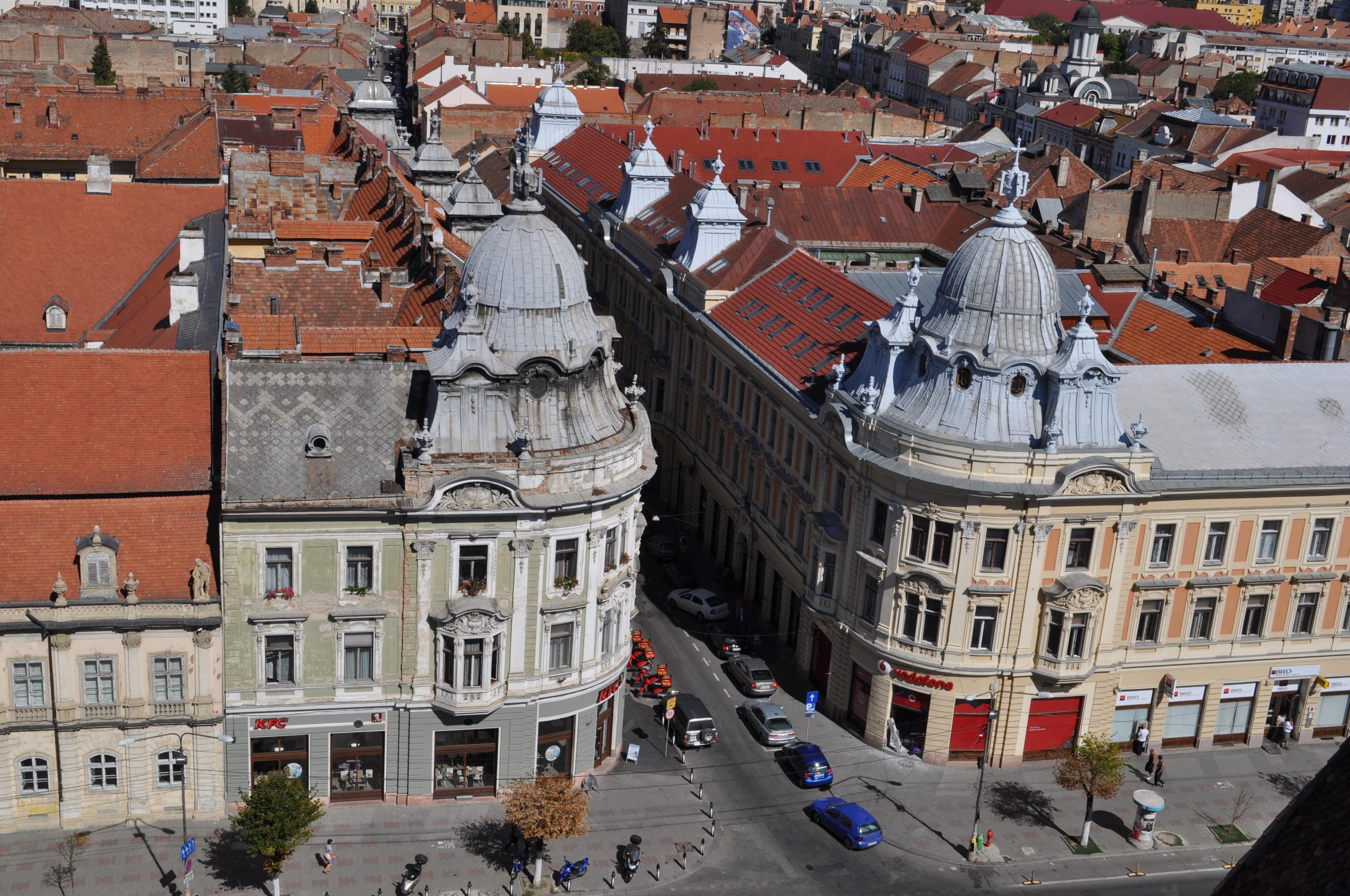 Palatele "Status-ului romano-catolic" 02